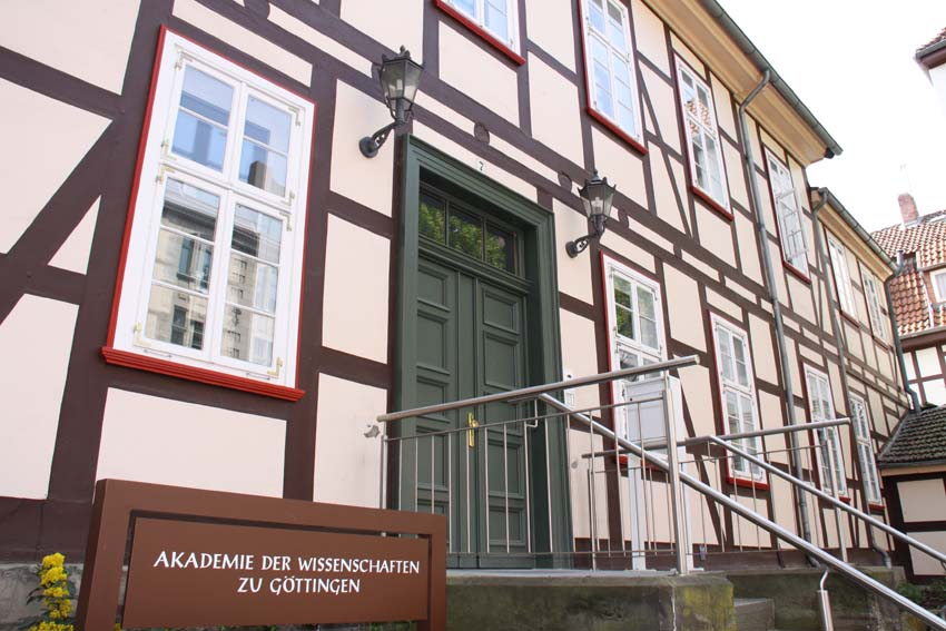 Akademie der Wissenschaften zu Göttingen